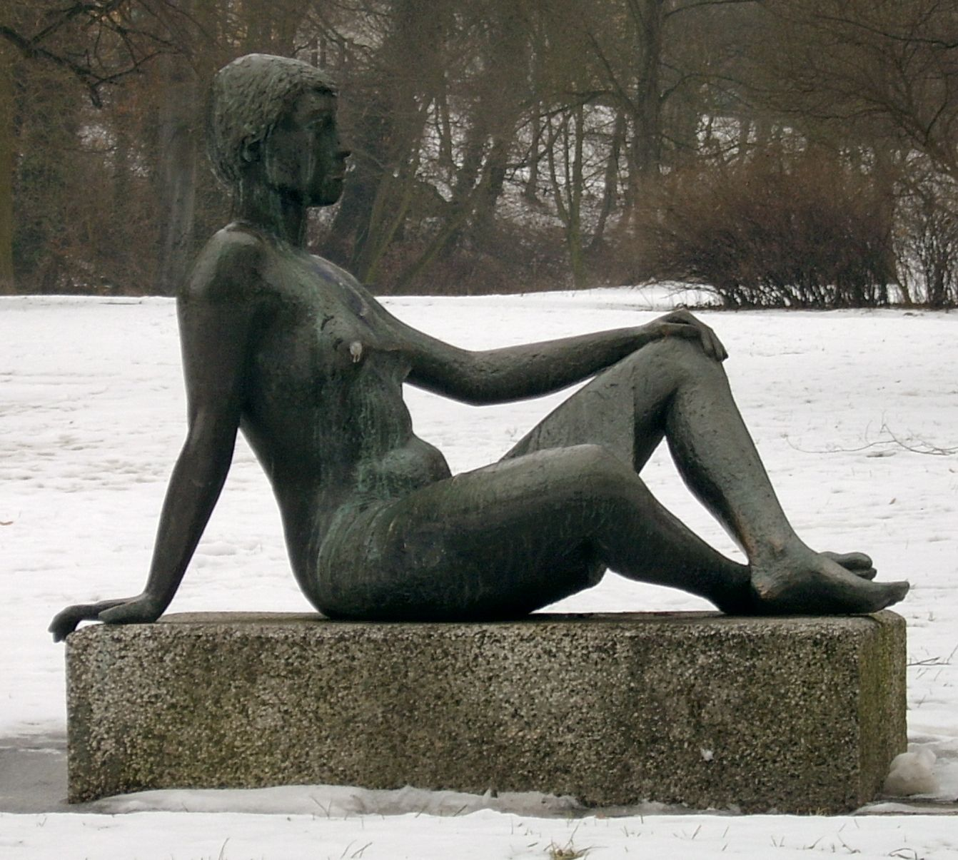 Die Bronzeplastik Die Sitzende befindet sich im Osten des Lennéparks in Frankfurt (Oder) und wurde vom Eisenhüttenstädter Herbert Burschik (1922-1990) gefertigt. Die 1,5 Meter hohe Bronzefigur wurde 1965 aufgestellt und zeigte eine junge sitzende Frau. [1]